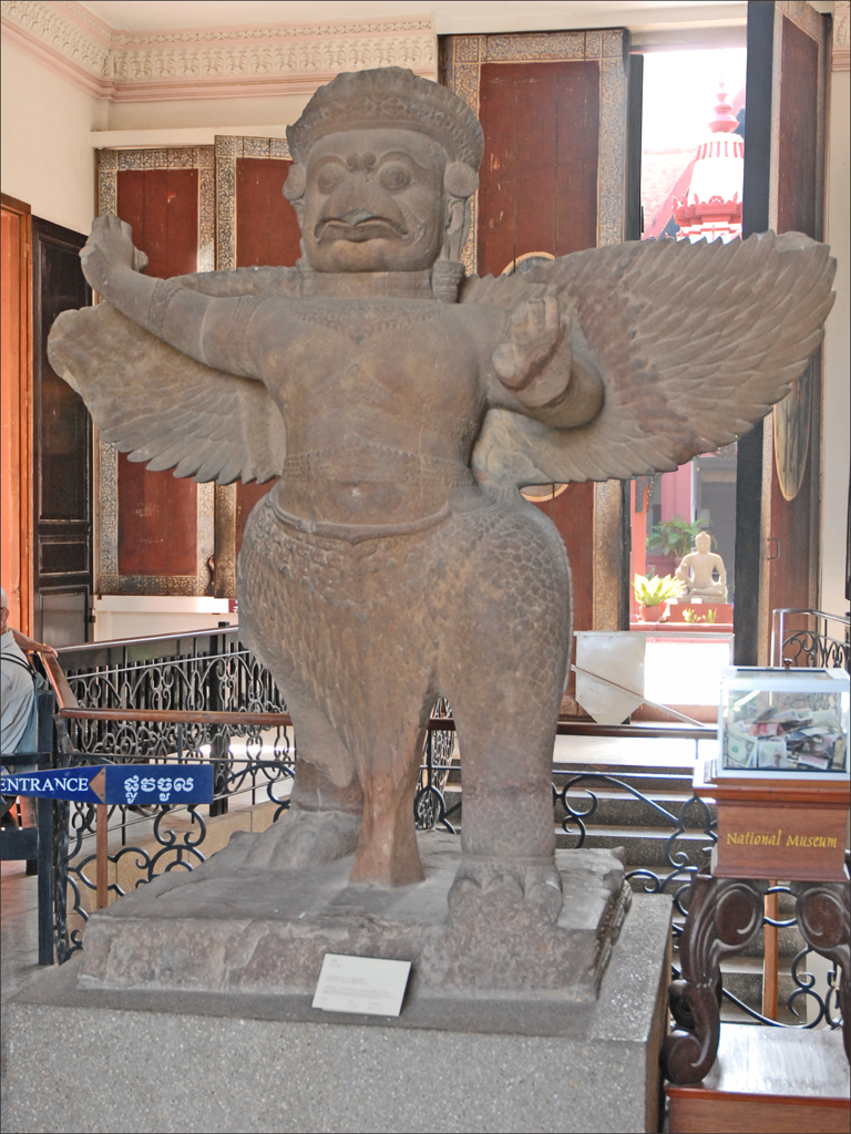 Garuda aux ailes déployées en attitude de marche Sculpture dans le hall du musée Provenance : Pr. Thom de Koh Ker 2ème quart du Xè siècle Grès gris Musée national du Cambodge